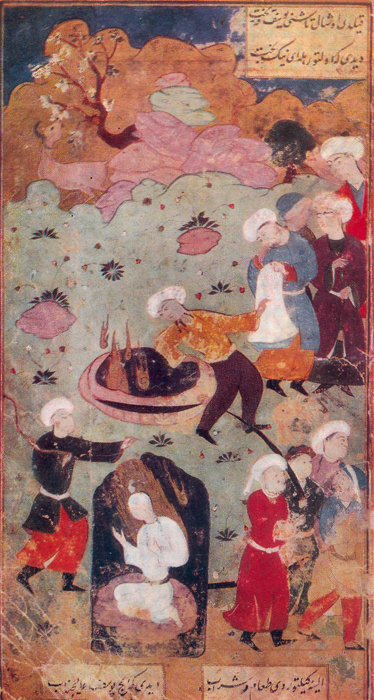 ЮСУФ, БРОШЕННЫЙ БРАТЬЯМИ В КОЛОДЕЦ, Дурбек. «Юсуф и Зулейха». Каллиграф Мухаммед-Саид ибн Мирза-Мухаммед. Рукопись ИВ АН УзССР, 1433, л. 9. 1615 г. Бухара